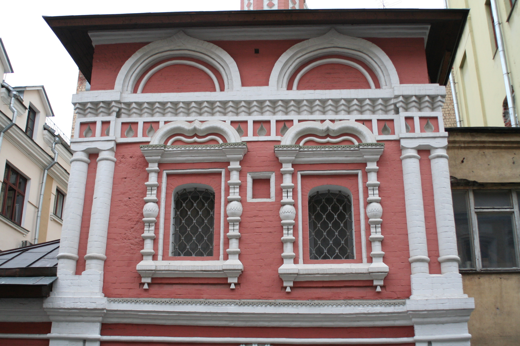 Церковь Космы и Дамиана в Старых Панех в Старопанском переулке Китай-города. 1640 год. Реставрация 2004-2007 гг.